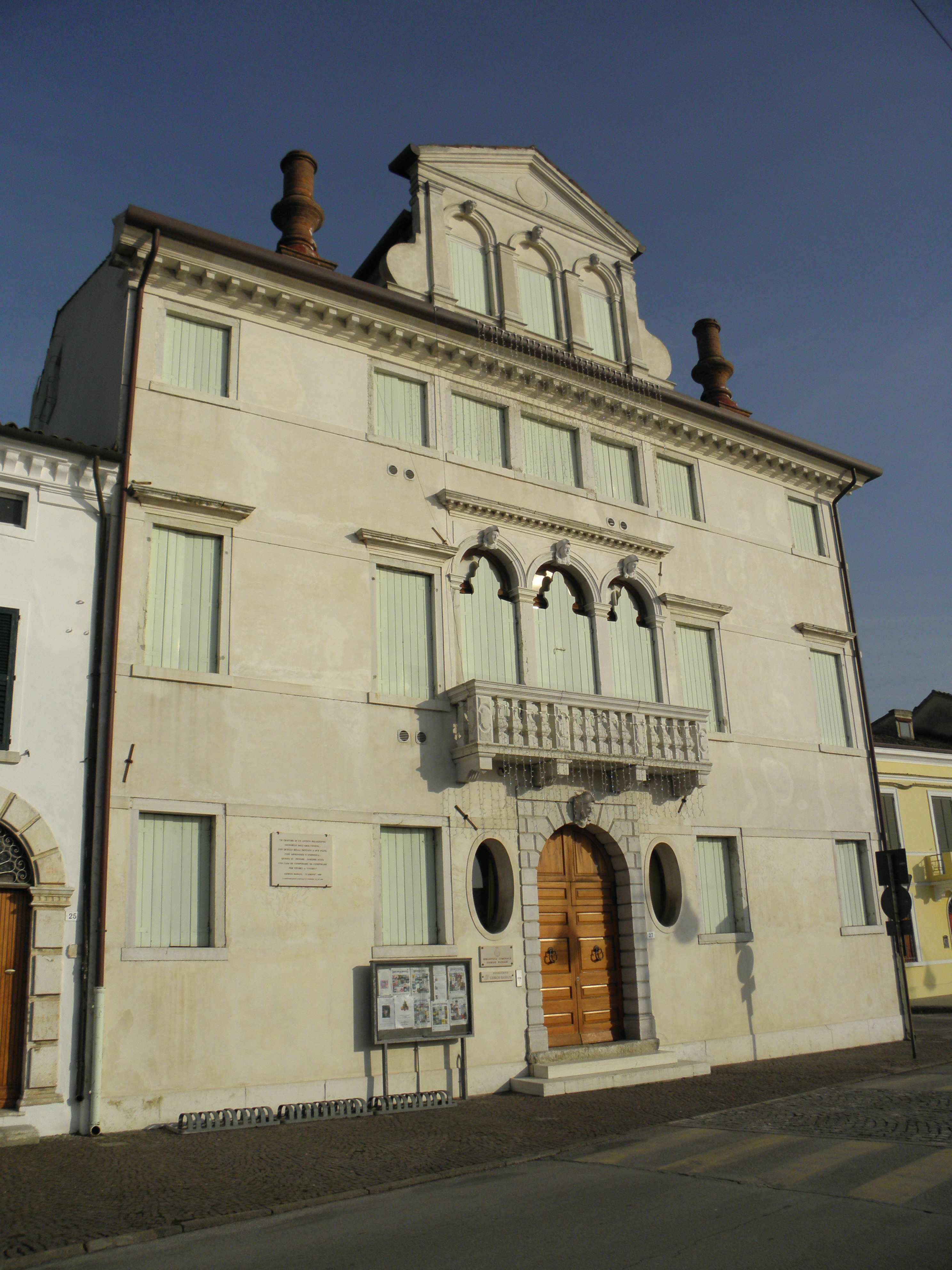 Codigoro: il Palazzo del Vescovo (XII-XVIII secolo).